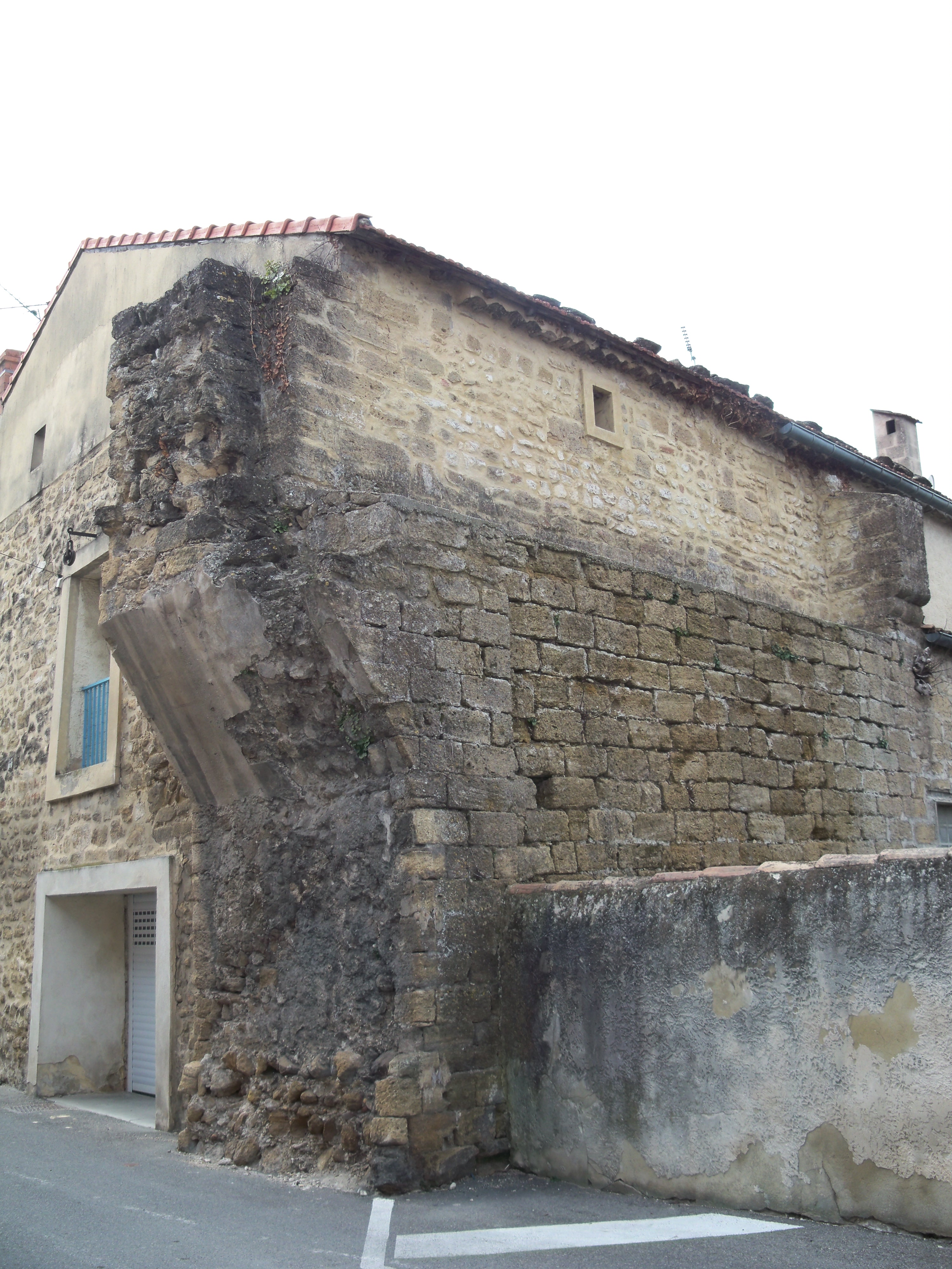 Vestiges de la porte d'entrée et de la fortification du palais des papes de Sorgues